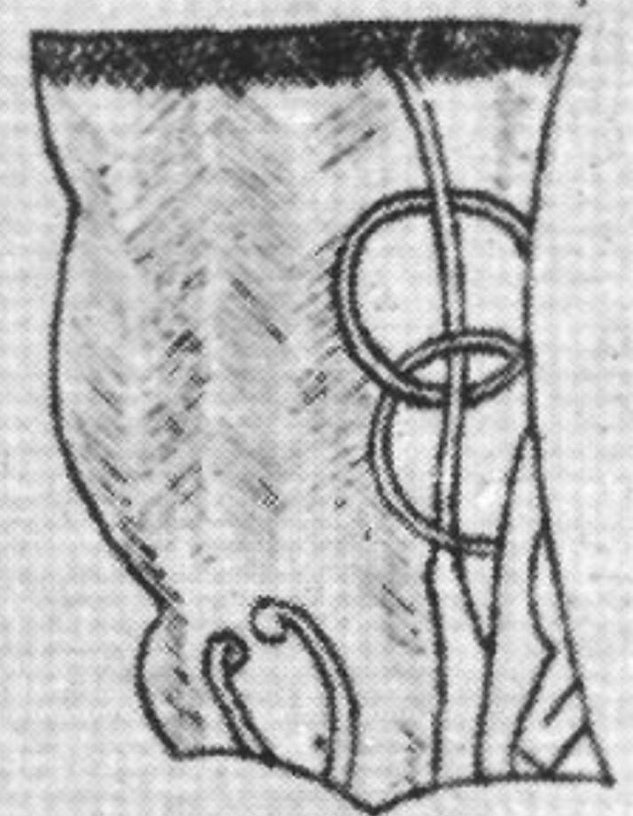 Avbildning av den nu försvunna runstenen, U850, som tidigare satt inmurad i en vägg i Balingsta kyrkas vapenhus